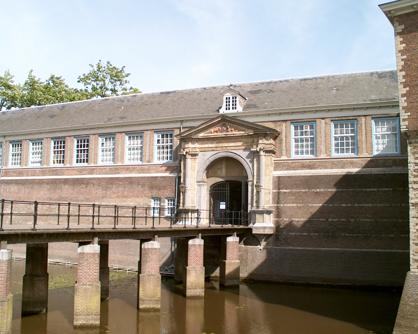 Zicht op een deel van de Stadhouderspoort, tevens ingang, en een deel van de Egmondgalerij van het Kasteel in Breda. Gevestigd aan het Kasteelplein 10 in Breda. Gelegen naast het Park Valkenberg en het nabij het centrum van Breda